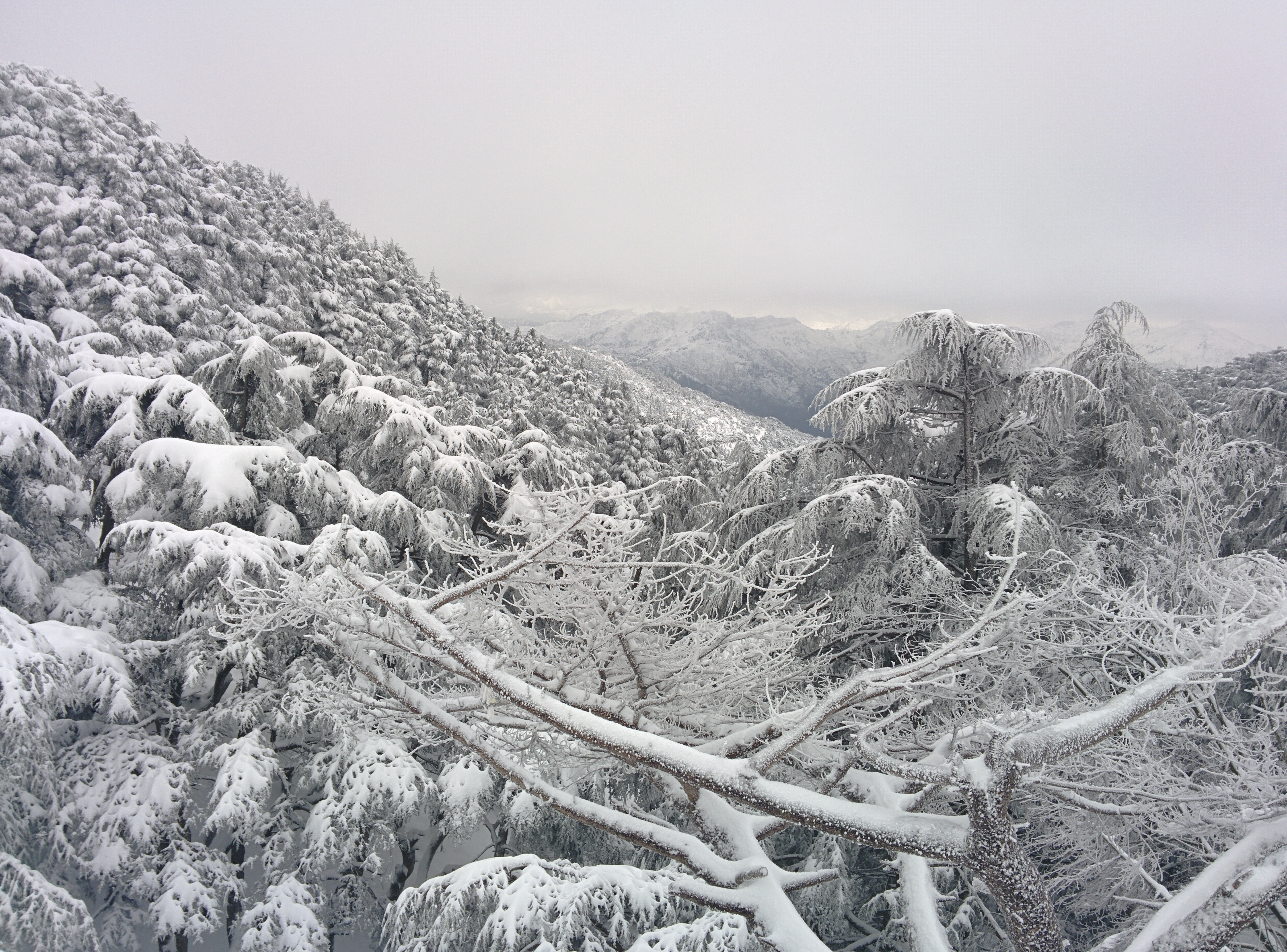 Station de sports d'hiver de Chréa à 50Km d'Alger, Wilaya de Blida